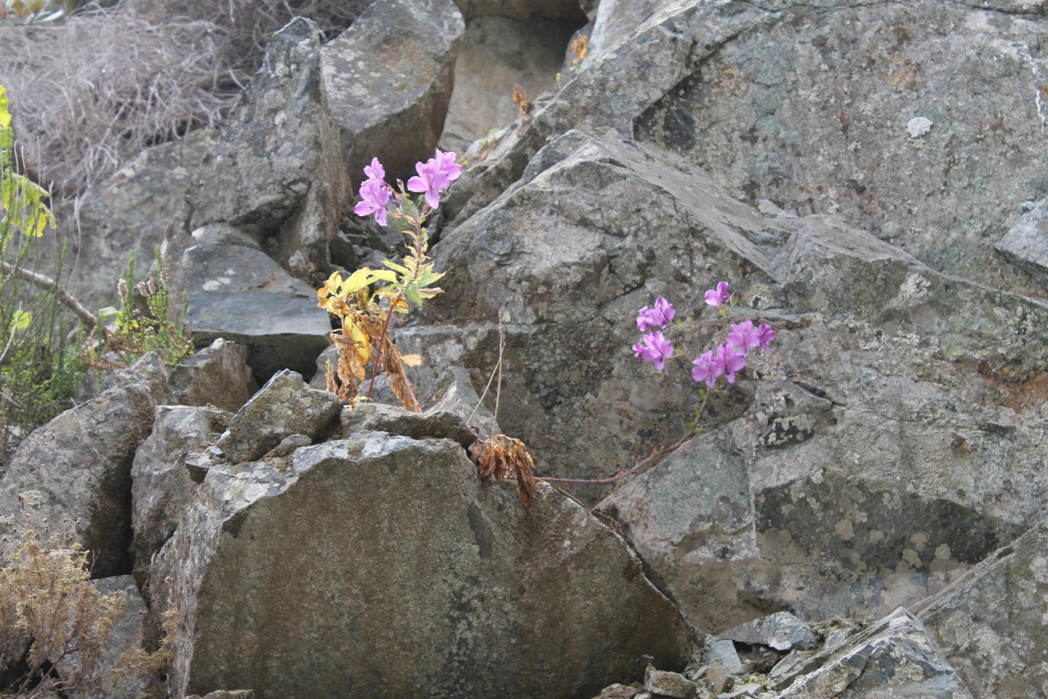 Quebrada El Medano, Paposo